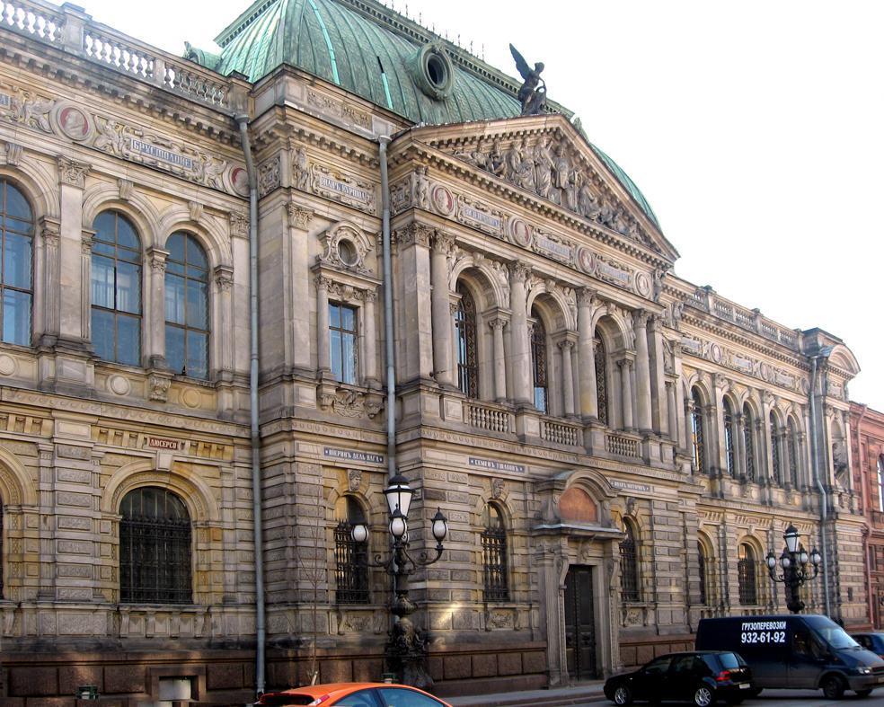 Sankt-Petěrburg